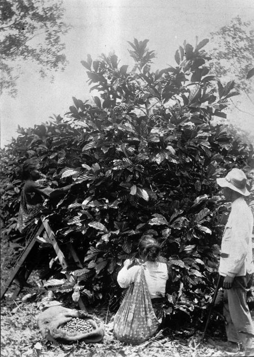 Foto. De linker foto laat de pluk van een koffiestruik zien. Een topografisch beeld omdat het de indruk geeft van datgene dat groeit en bloeit in Suriname. De twee personen op de voorgrond geven een voorveeld van bewerking van een struik, namelijk het plukken van een vrucht. Vermoedelijk plukt van de twee aaleeen de vrouw, zij is de enige van de twee met een zak oveer haar schouder waar bessen in zouden kunnen. De man zit niet in de struik maar staat er naast, vermoedelijk als opzichter. Op de achtergrond aan de linkerkant staat een dame op een trapje ook bessen te plukken. Na de pluk dienen deze gedroogd en verwerkt te worden tot koffiebonen. (Knops, M, 'Suriname door het oog van Augusta Curiël', Amsterdam 2005, 85) (L.Borghuis, 2008). Suriname, pluk van koffiebonen